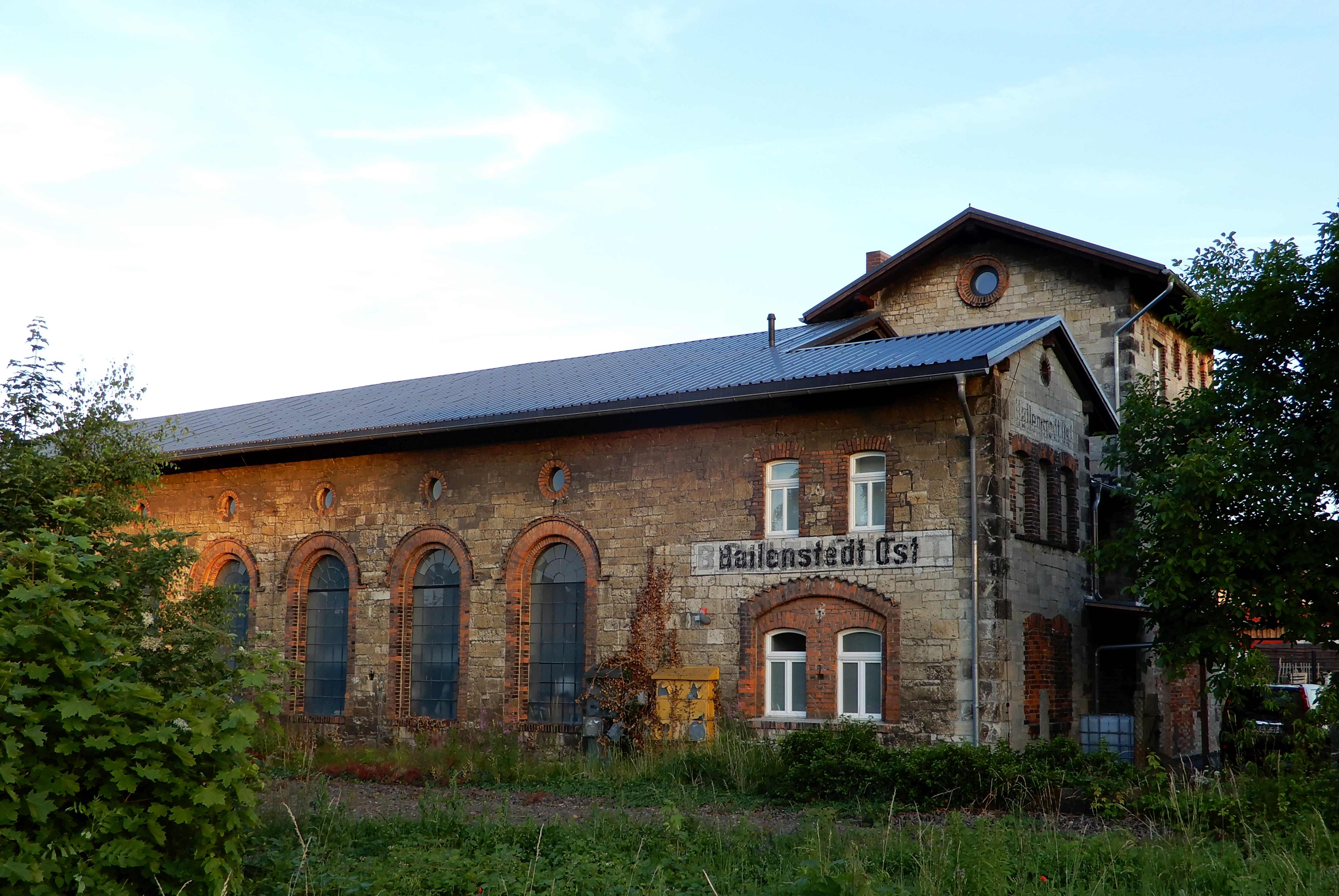 Ehemalige Lokhalle am Schwarzen Weg in der Nähe des Bahnhofs Ballenstedt-Ost